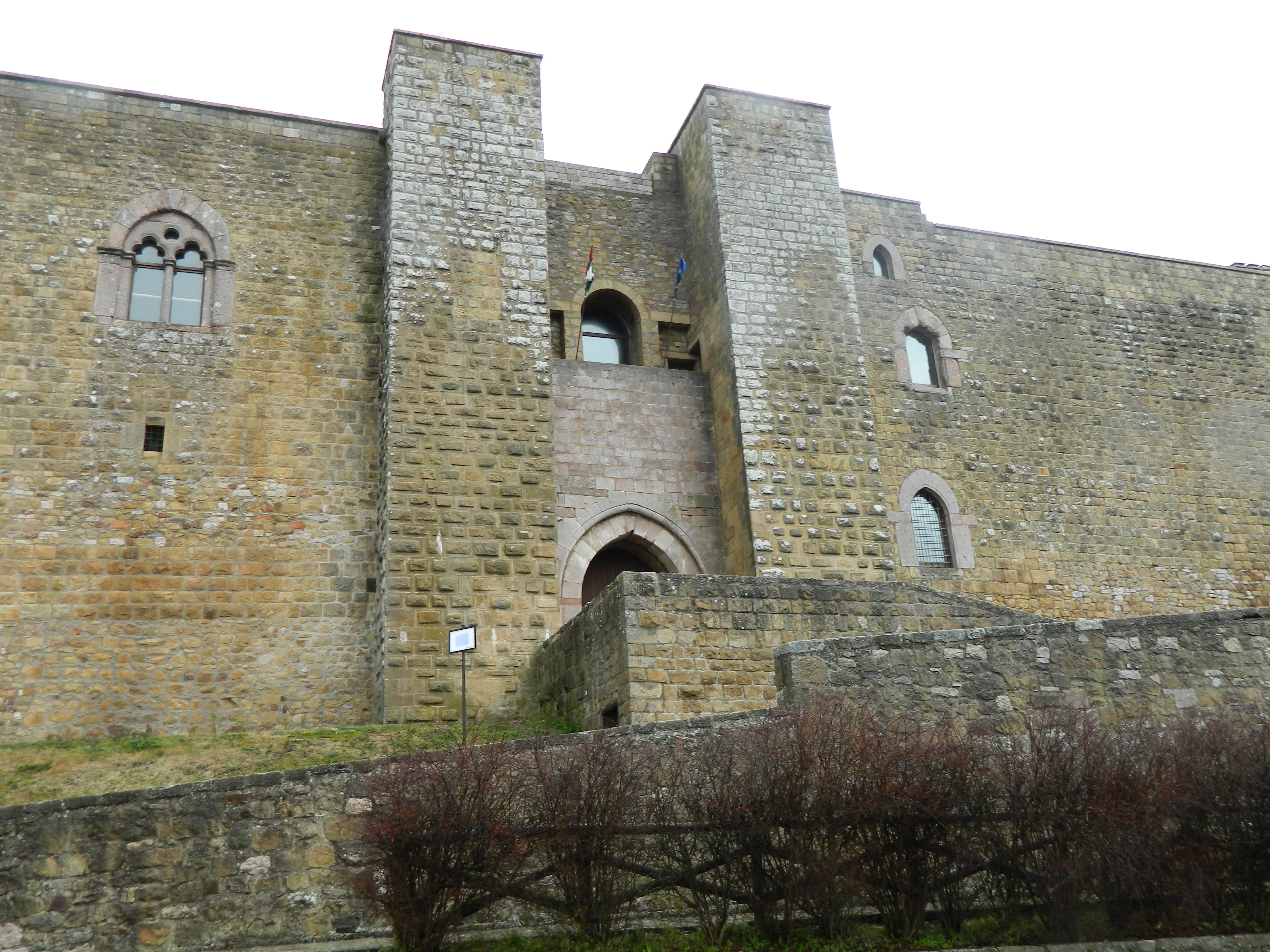 Castello di Lagopesole (Avigliano, PZ) , Particolare dell'unico ingresso